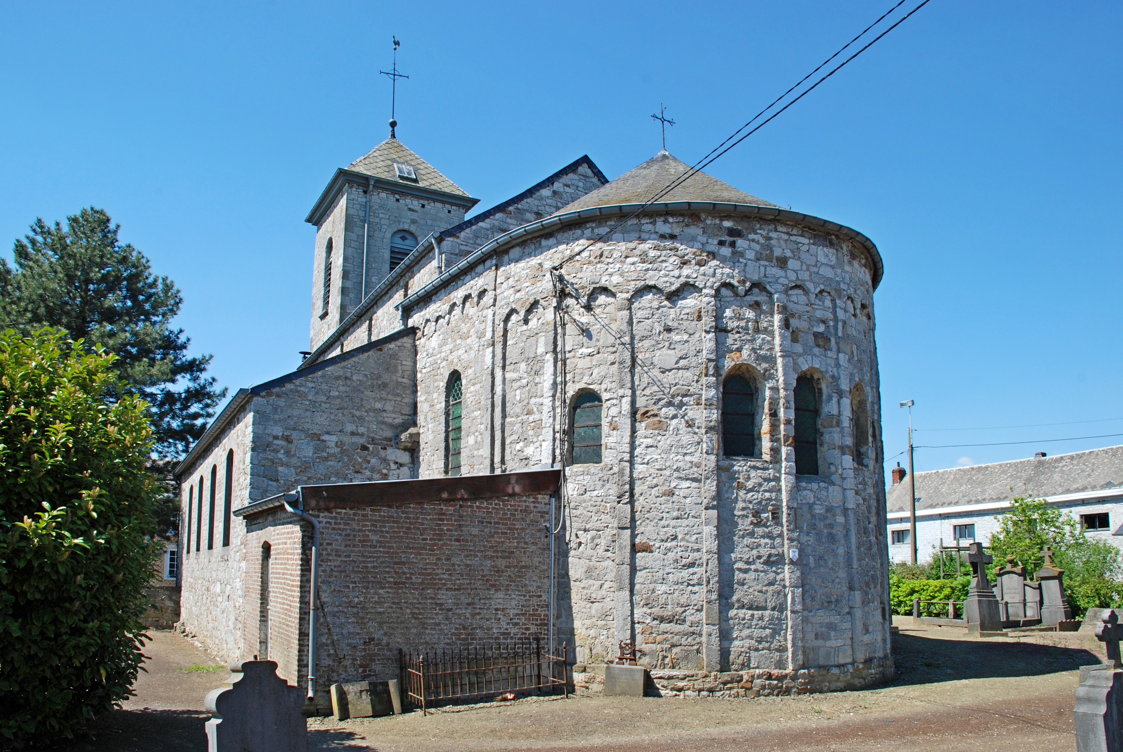 Belgique - Wallonie - Église Saint-Laurent de Bois (Bois-et-Borsu)